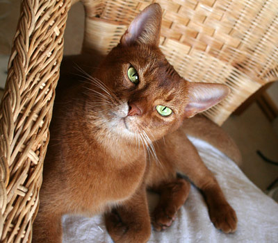 Min sorrelfärgade abessinier Wincent, Foto och källa: Linda Andersson